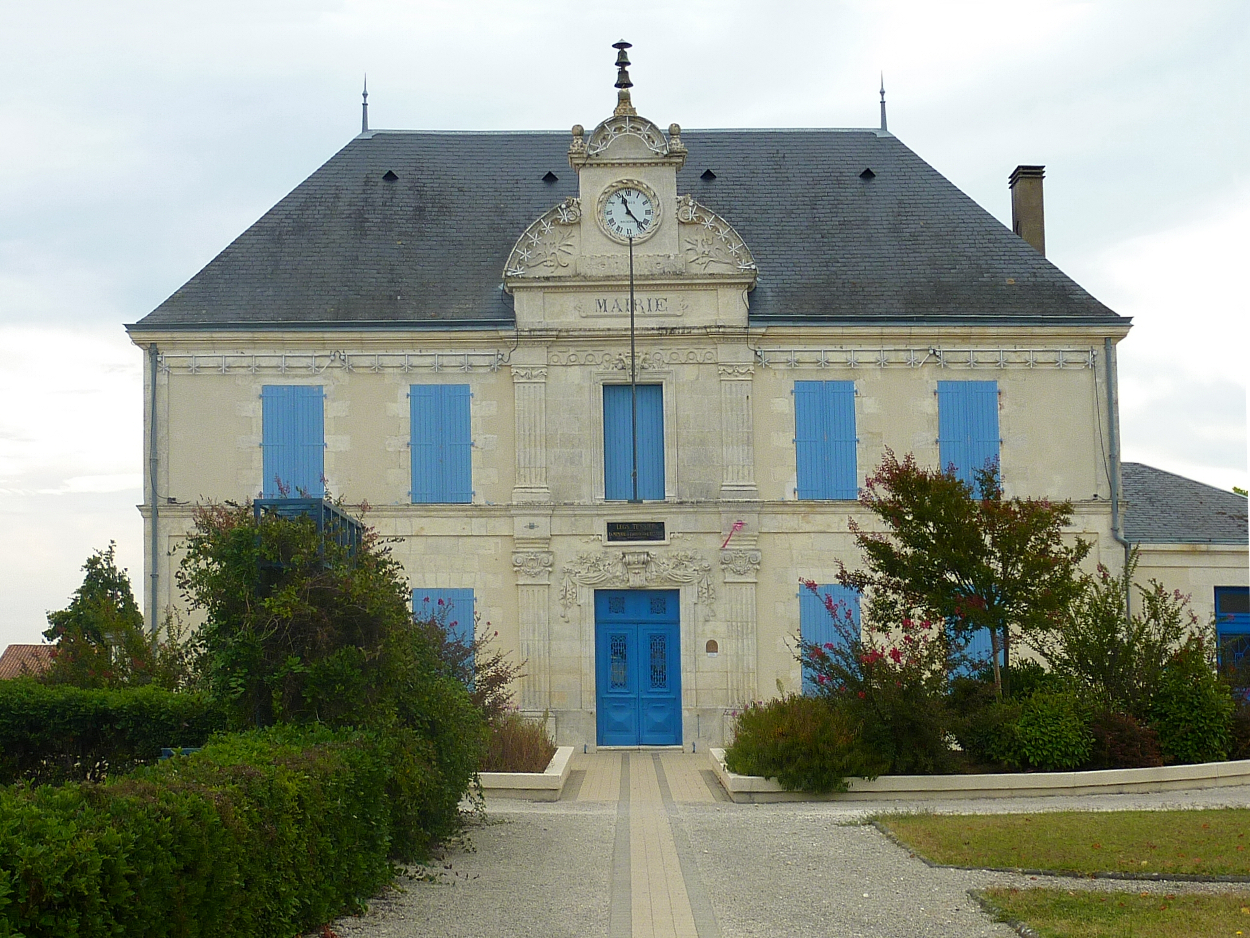 Mairie Saint-Laurent-de-la-Prée Charente Maritime France